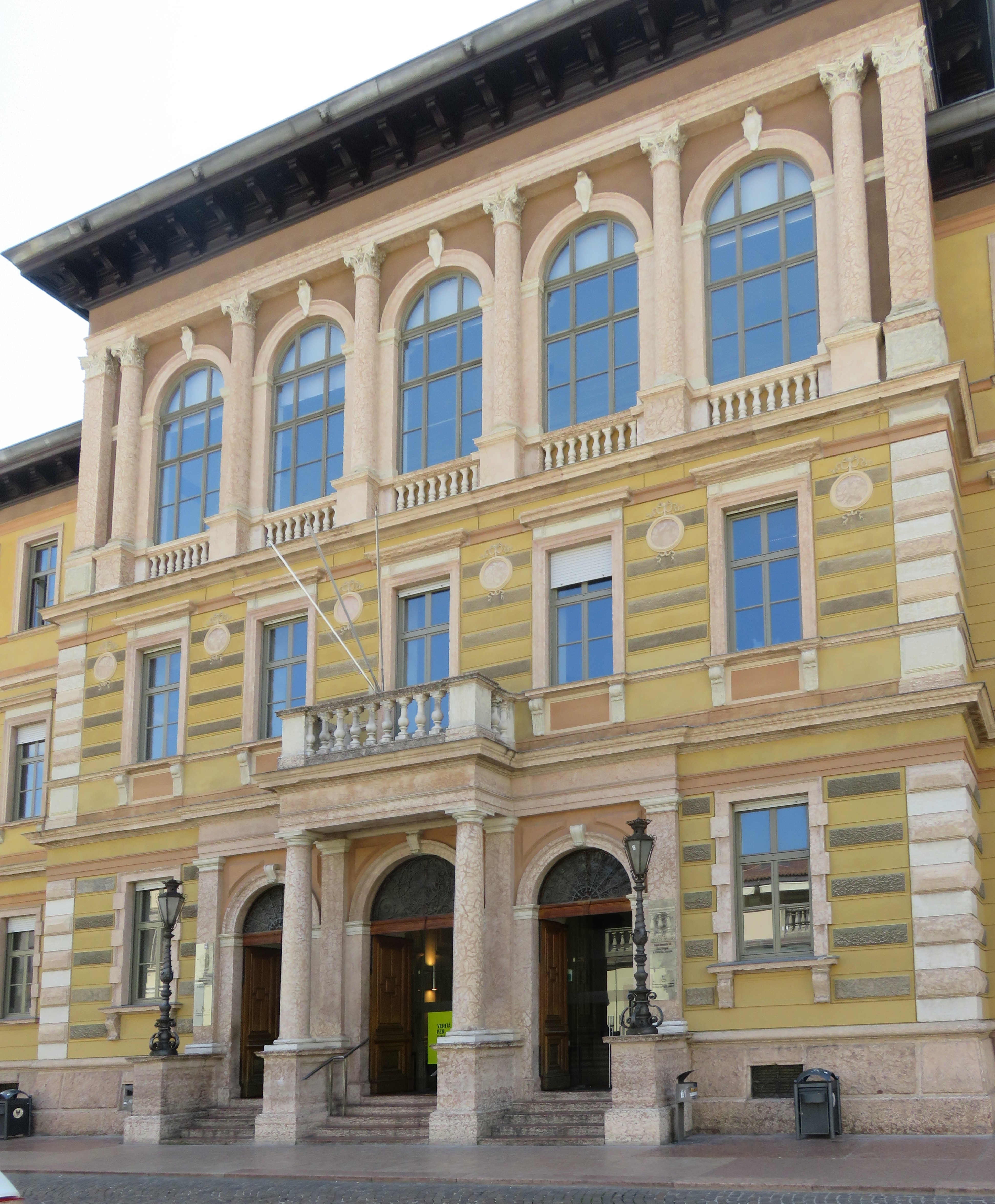 Palazzo Istruzione in Via Verdi - Sede di Sociologia